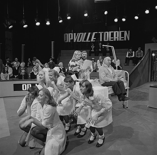 Jo de Meyere (als Dokter Angelino) en Piet Bambergen in Op volle toeren in 1980